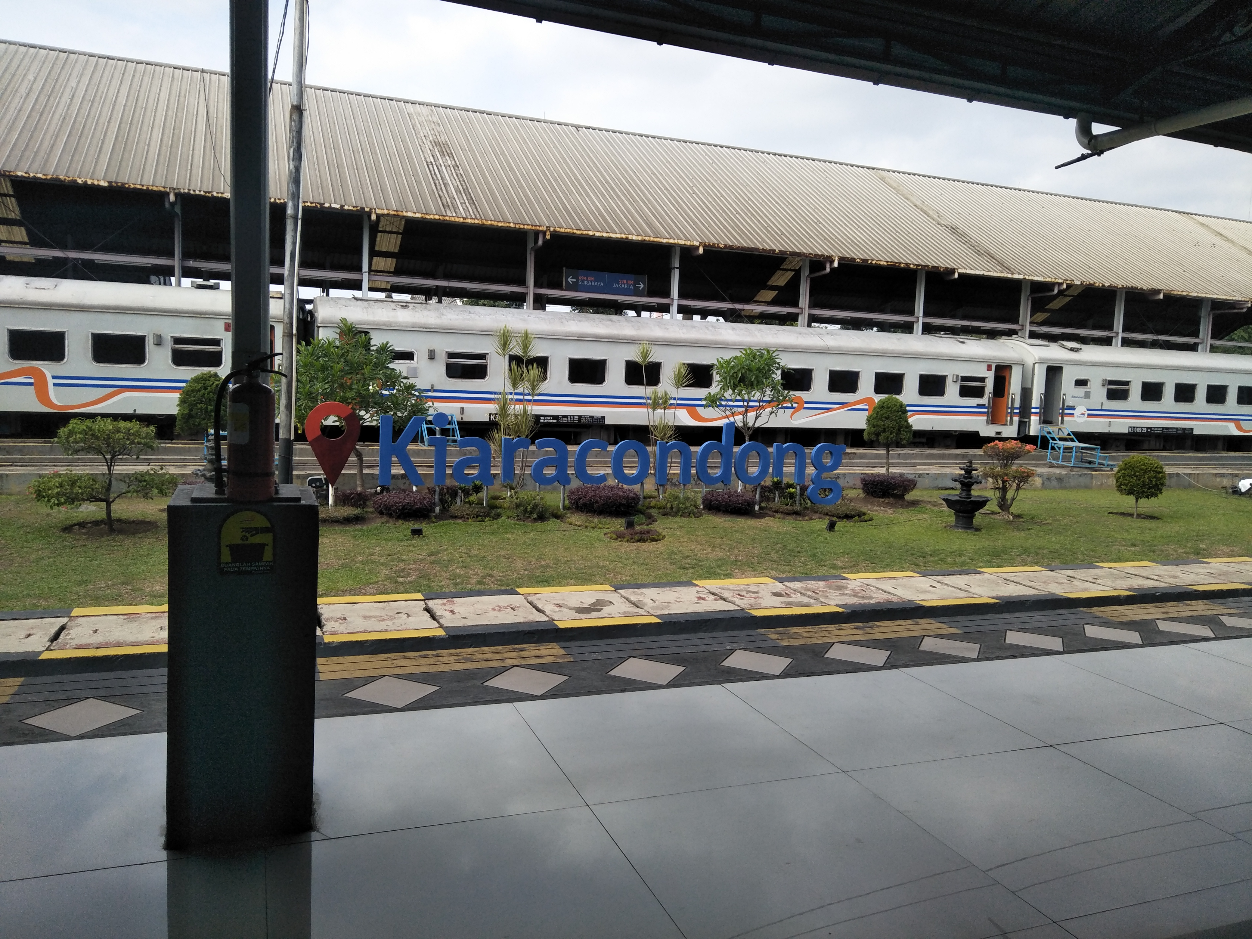 Stasiun Kiaracondong bagian utara, terdapat KA Kahuripan yang idle di siang hari